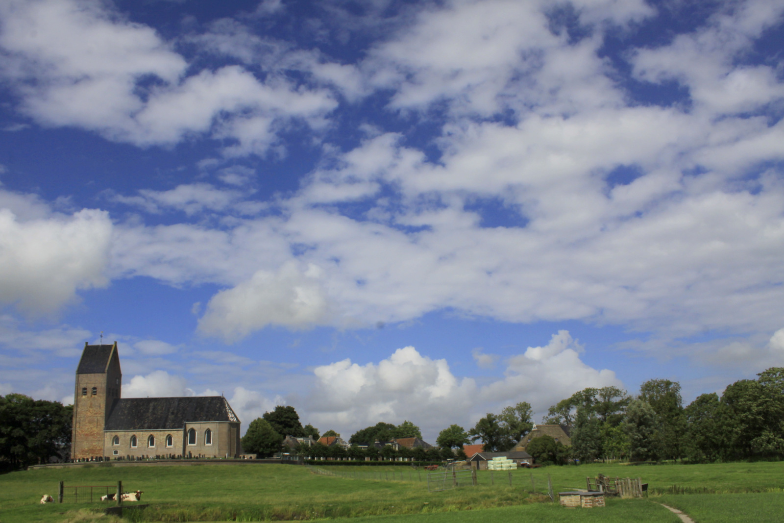 Van ver kun je al zien dar Wanswerd een terpdorp is.